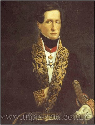 Jean René Constant Quoy 1790—1869